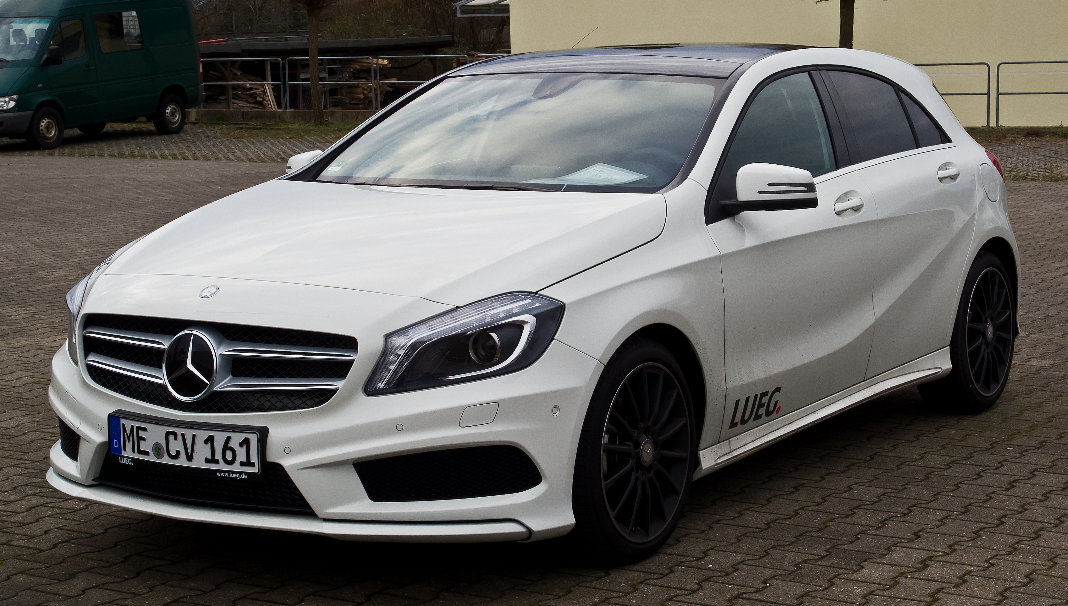 Mercedes-Benz A 180 AMG Line (W 176)